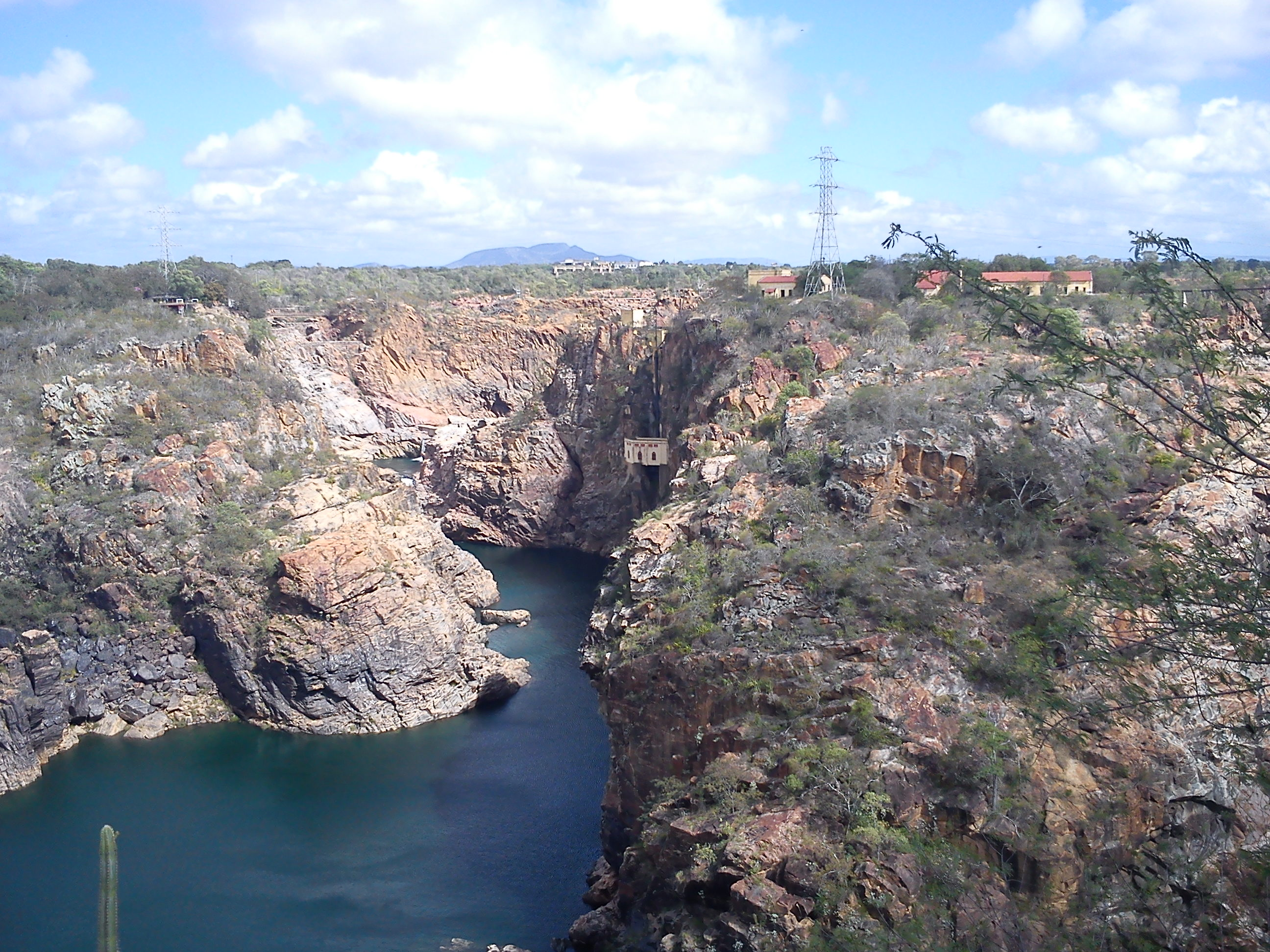 Vista da Usina Hidrelétrica de Angiquinhos, a primeira da América Latina, fundada em 1917 por Delmiro Gouveia no local onde hoje há a Usina Hidrelétrica de Paulo Afonso, divisa entre Alagoas, Bahia e Pernambuco.